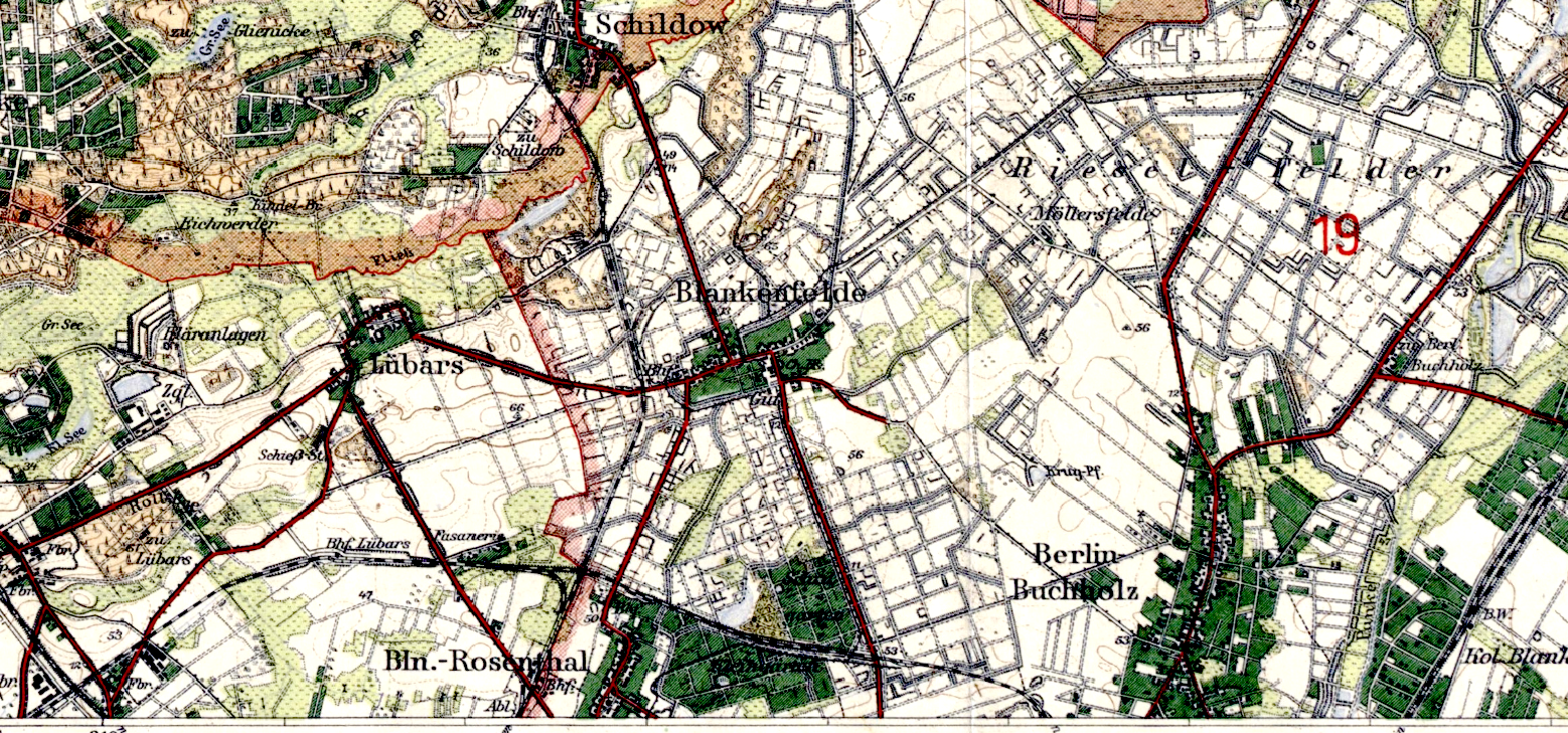 Karte von Berlin und Umgebung (1922) in 12 Blättern II Oranienburg auf das Gebiet um Blankenfelde eingegrenzt